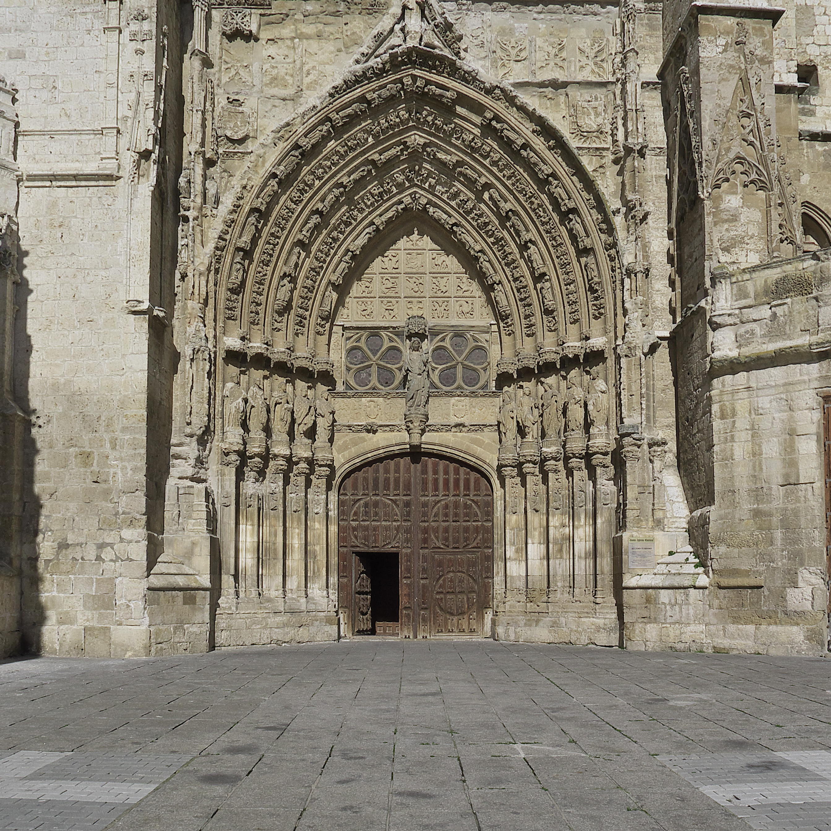 También llamada de Santa María. Portada situada en el extremo meridional del transepto. Promovida por Diego Hurtado de Mendoza y Quiñones, obispo de Palencia entre los años 1471 y 1485. Interviene el maestro mayor Bartolomé de Solórzano. Juan Rodríguez de Fonseca, obispo entre 1504 y 1511, la terminaría con la intervención escultórica.